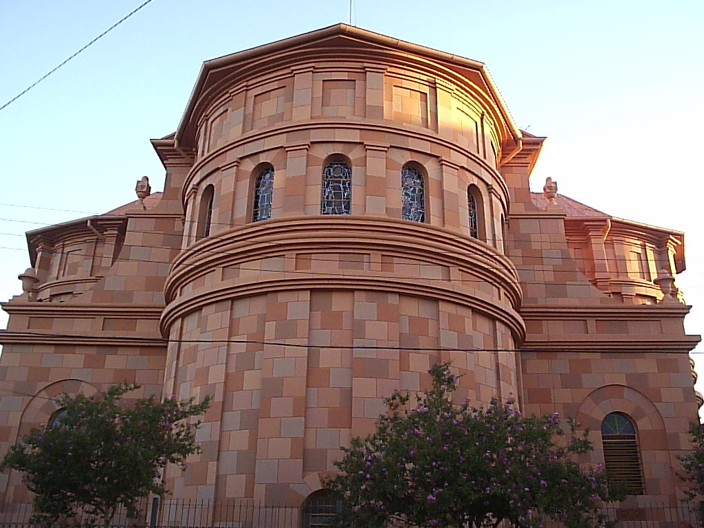 Vista da cabeceira da Catedral Angelopolitana, Santo Ângelo, Rio Grande do Sul, Brasil.